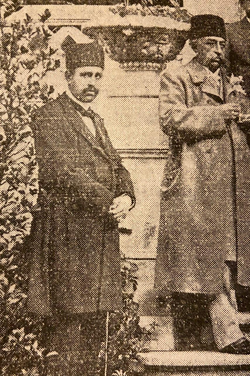 ناصر همایون رئیس موزیک سلطنتی در کنار مظفر الدین‌شاه قاجار